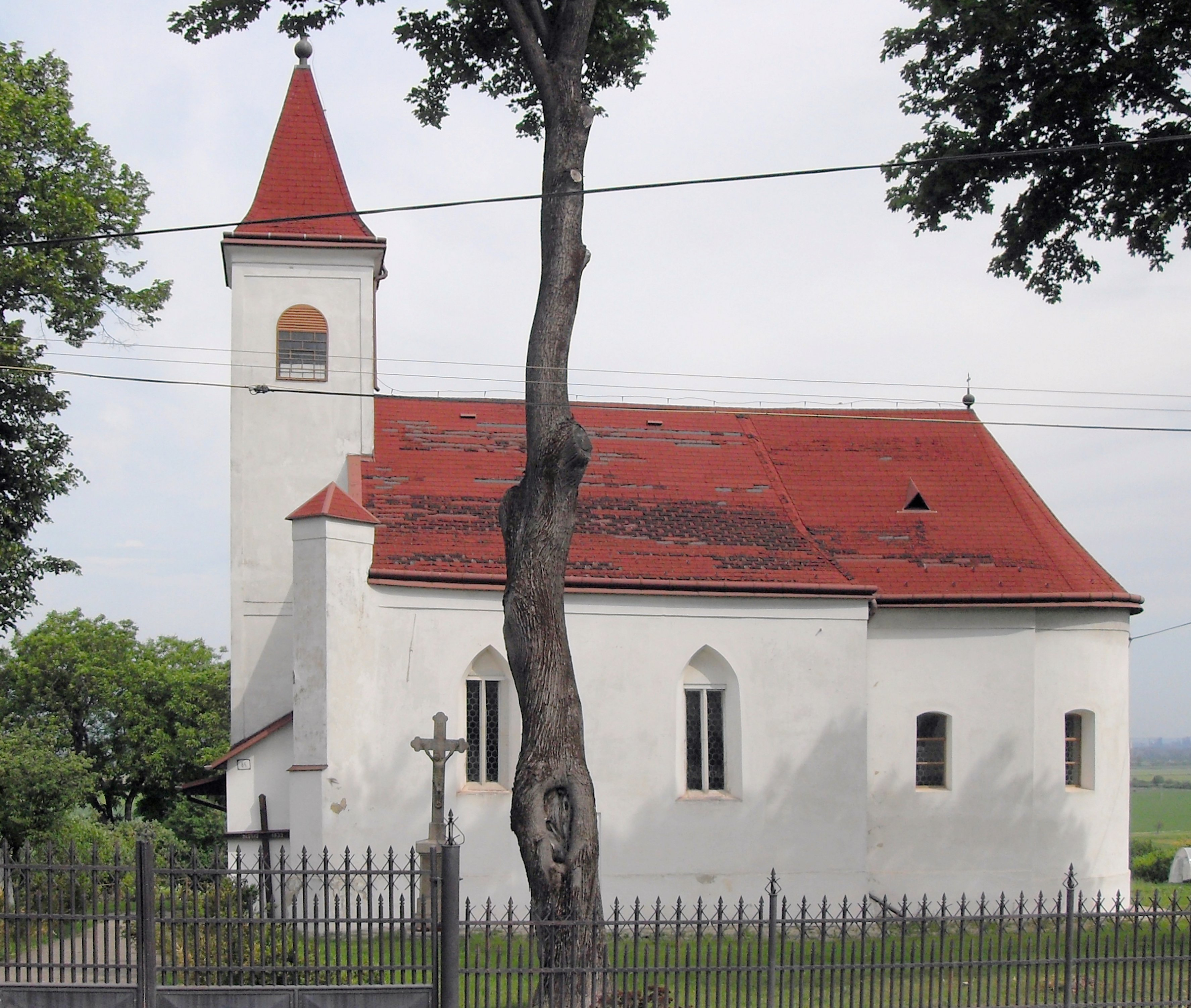 Perín-Chym, Rímskokatolícky Kostol svätého Štefana Uhorského v časti Chym